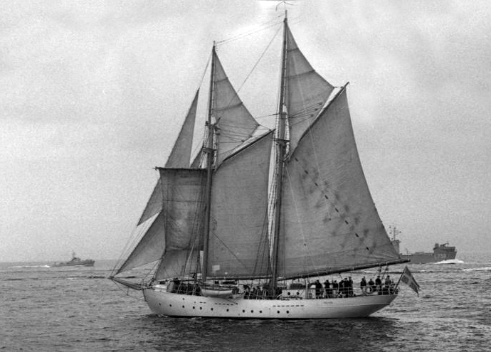 Kieler Woche 1962 20.-24.6.1962